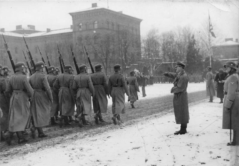 Der Führer besichtigt die Leibstandarte "Adolf Hitler" in der ehemaligen Kadettenanstalt in Berlin-Lichterfelde! Vorbeimarsch der Leibstandarte vor dem Führer. Hinter dem Führer der Kommandeur Obergruppenführer Sepp Dietrich.